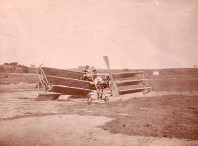 Alfred Groos, 1909, Essai sur triplan à Pen en Toul. A l'arrière plan, la maison blanche Route de Vannes et le Moulin